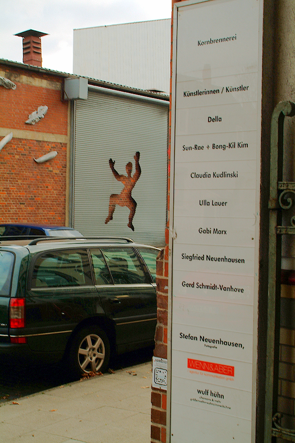 In der Kornbrennerei (Bertramstraße 4 in Hannover, Stadtteil Hainholz) waren laut Hinweistafel im Dezember 2011 folgende Künstlerinnen und Künstler tätig und/oder beheimatet: Della, Sun-Rae + Bong-Kil Kim, Claudia Kudlinski, Ulla Lauer, Gabi Marx, Siegfried Neuenhausen, Gerd Schmidt-Vanhove, Stefan Neuenhausen, Wenn und Aber - agentur für kommunikation GmbH , Wulf Hühn - Chansons und mehr ...